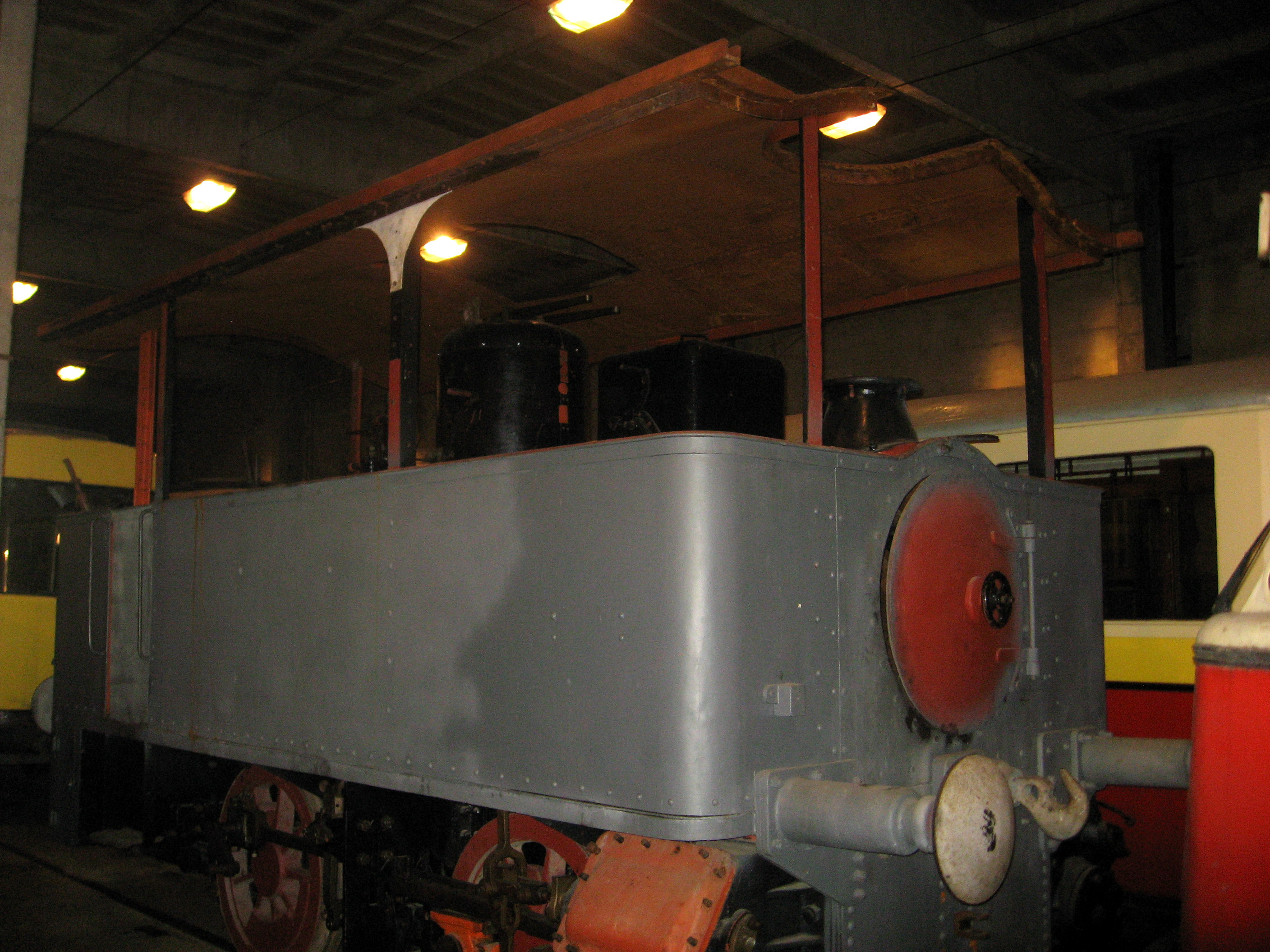 Ostravská tramvajová parní lokomotiva ev. č. 3 "Witkowitz", rok výroby 1894, výrobce Krauss Linz – exponát Technického muzea v Brně, depozitář MHD v Líšni